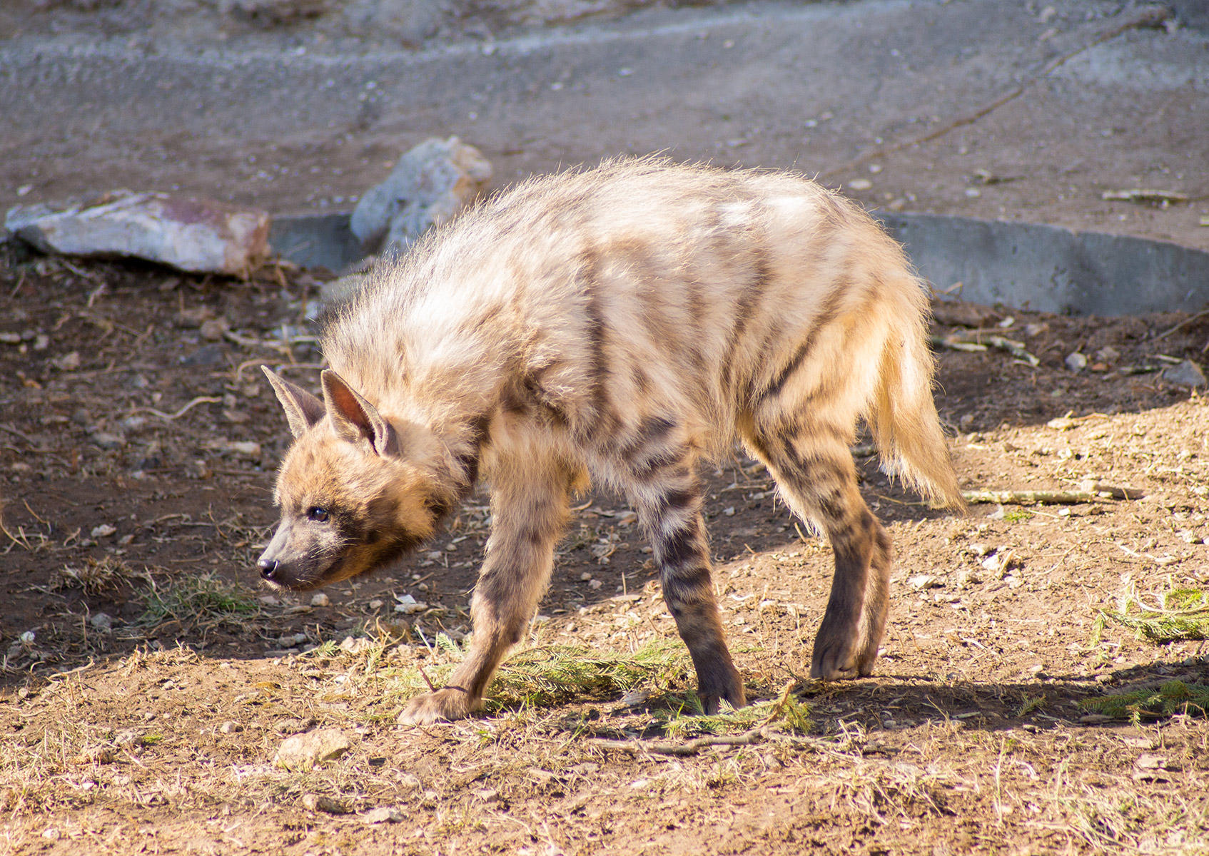 Полосатая гиена в Московском зоопарке